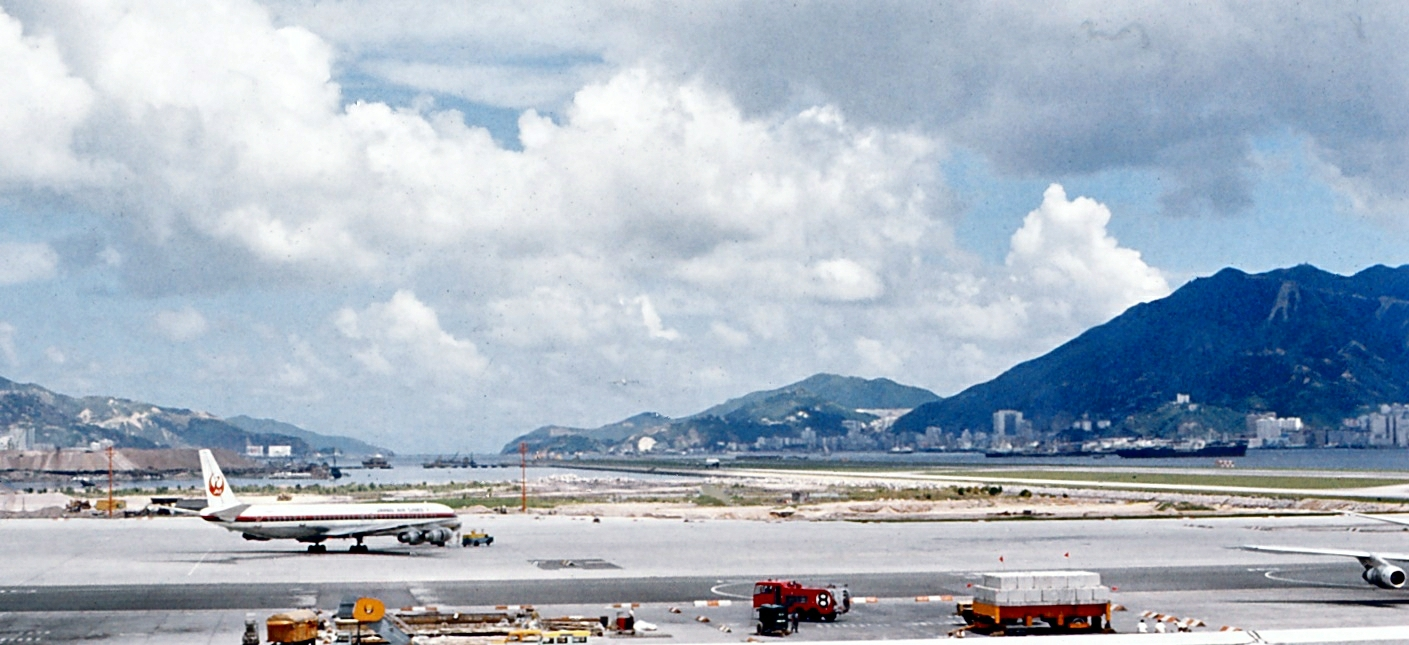 Hong Kong Kai Tak Airport in 1971